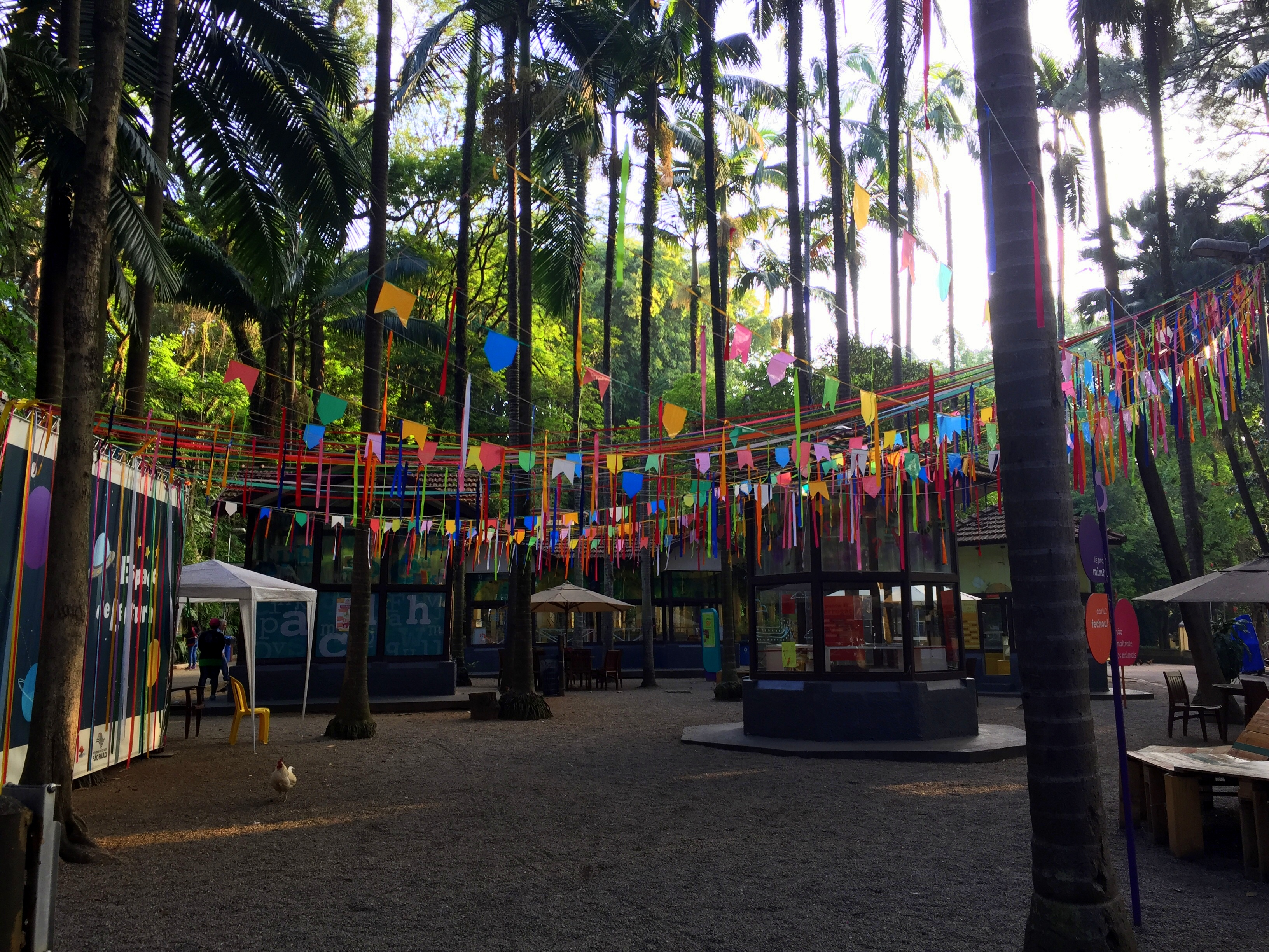 Espaço de Leitura Parque da Água Branca, em São Paulo (SP), Brasil.